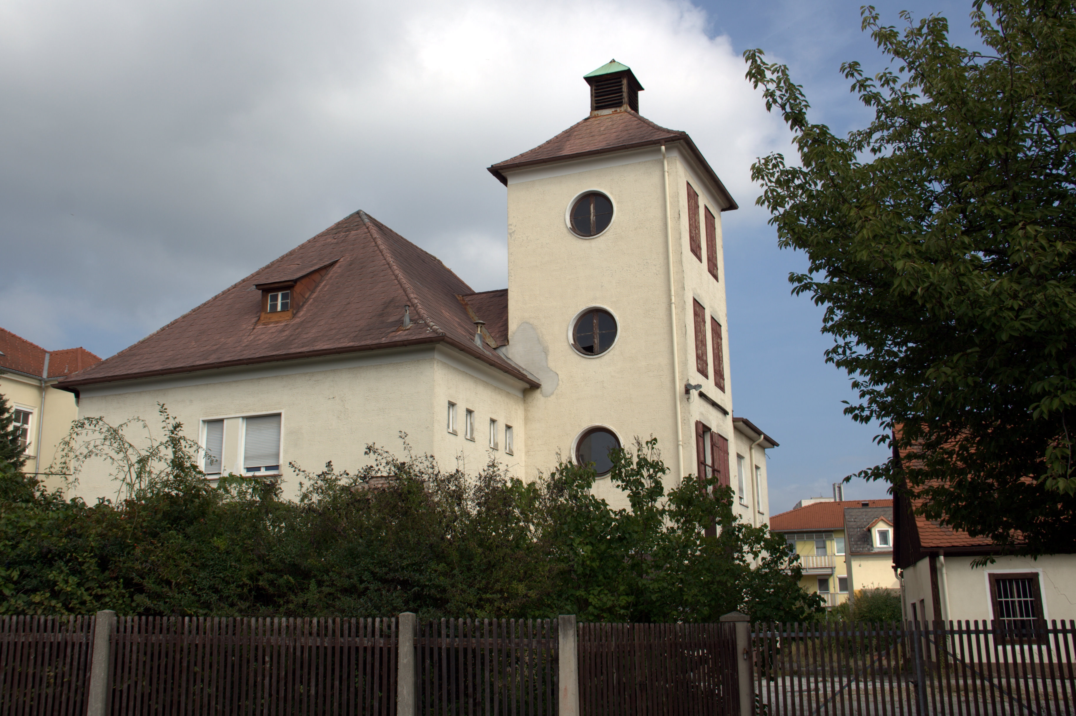 Feuerwehrgebäude Algersdorf